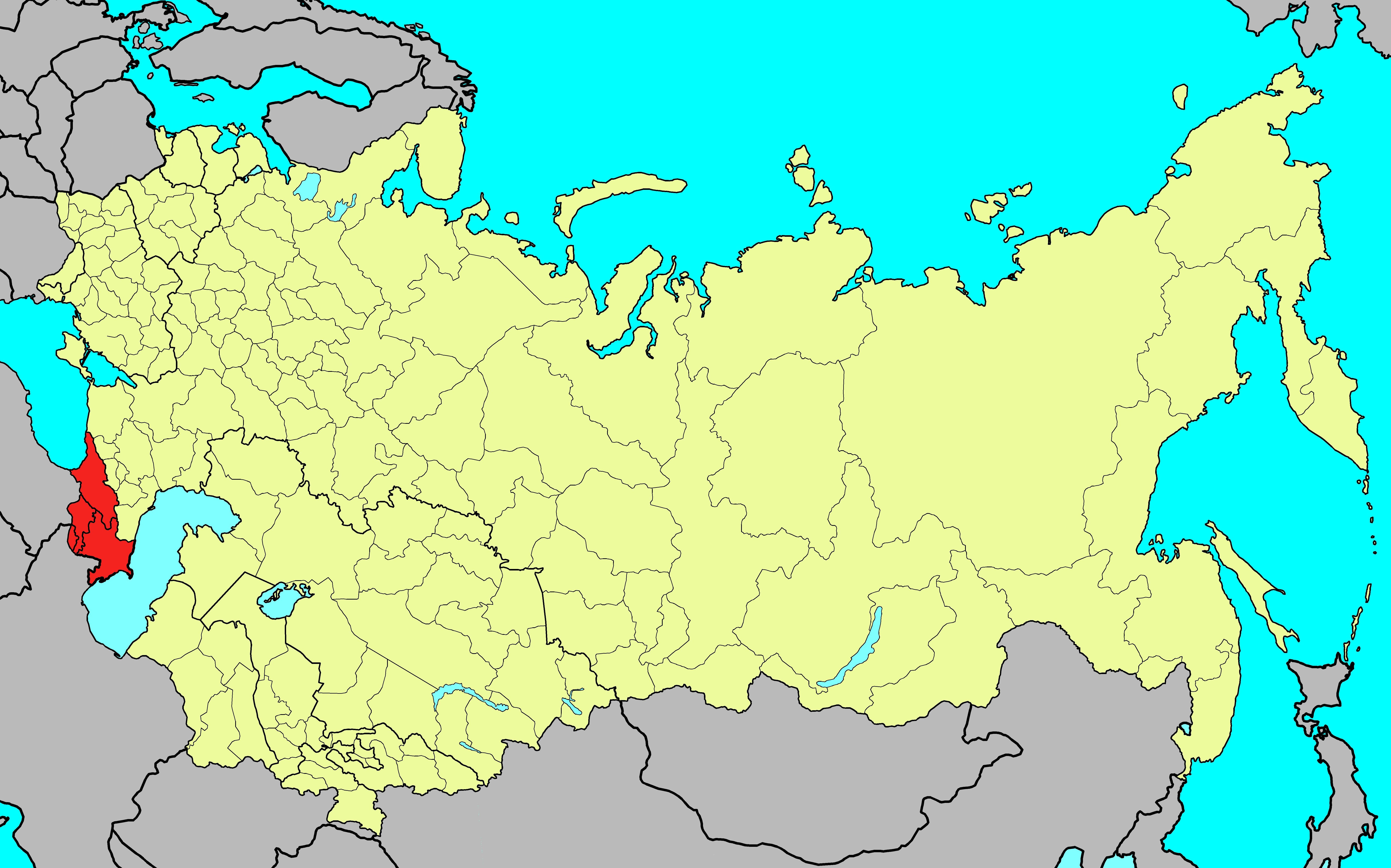 Закавказский военный округ ВС СССР на 1991 год